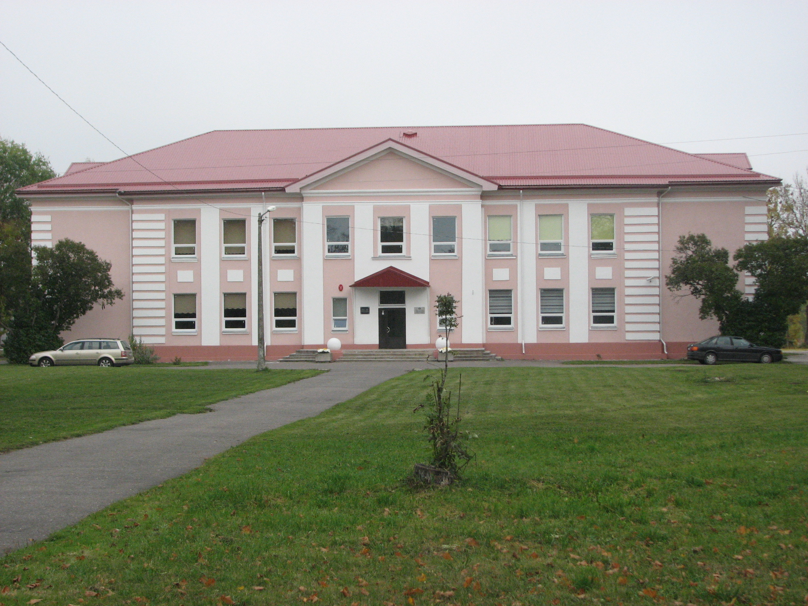 Maja Kukrusel aadressil Lehe 12 – Tallinna Tervishoiu Kõrgkooli Kohtla-Järve osakond